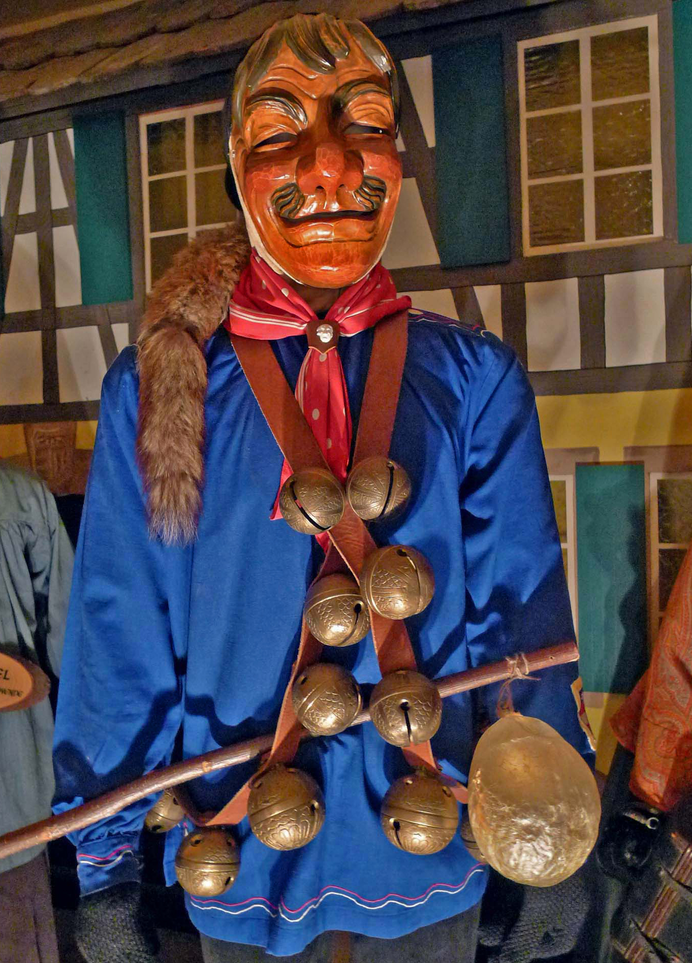 Häs der Narrenzunft Welle-Bengel Kenzingen, in der Oberrheinischen Narrenschau Kenzingen, dem Fasnetmuseum der Vereinigung Oberrheinischer Narrenzünfte, ausgestellt. Die Figur stellt den Holzmacher und Holzfuhrmann aus dem Kenzinger Hochwald dar.